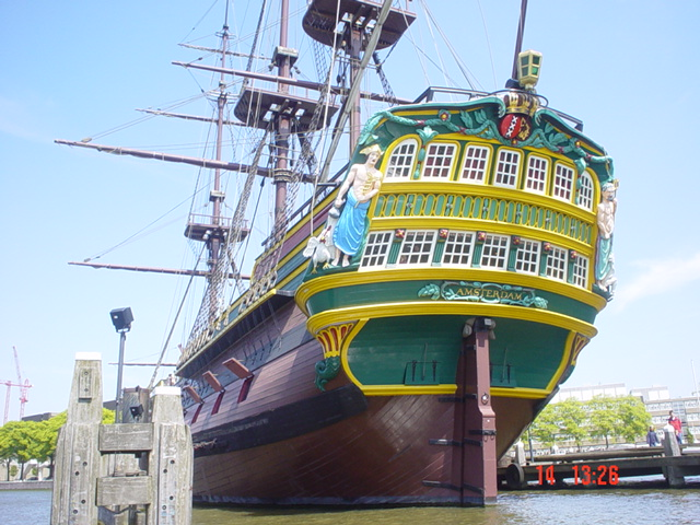 VOC ship Amsterdam